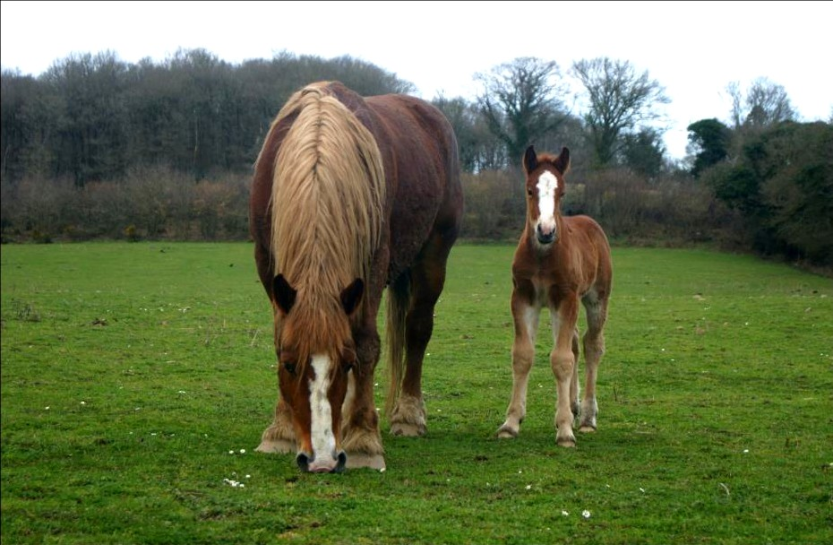 Unité de Plémet et sa pouliche Dream's St Fiacre appartenant à l'élevage de Kerloc à St Fiacre (22)